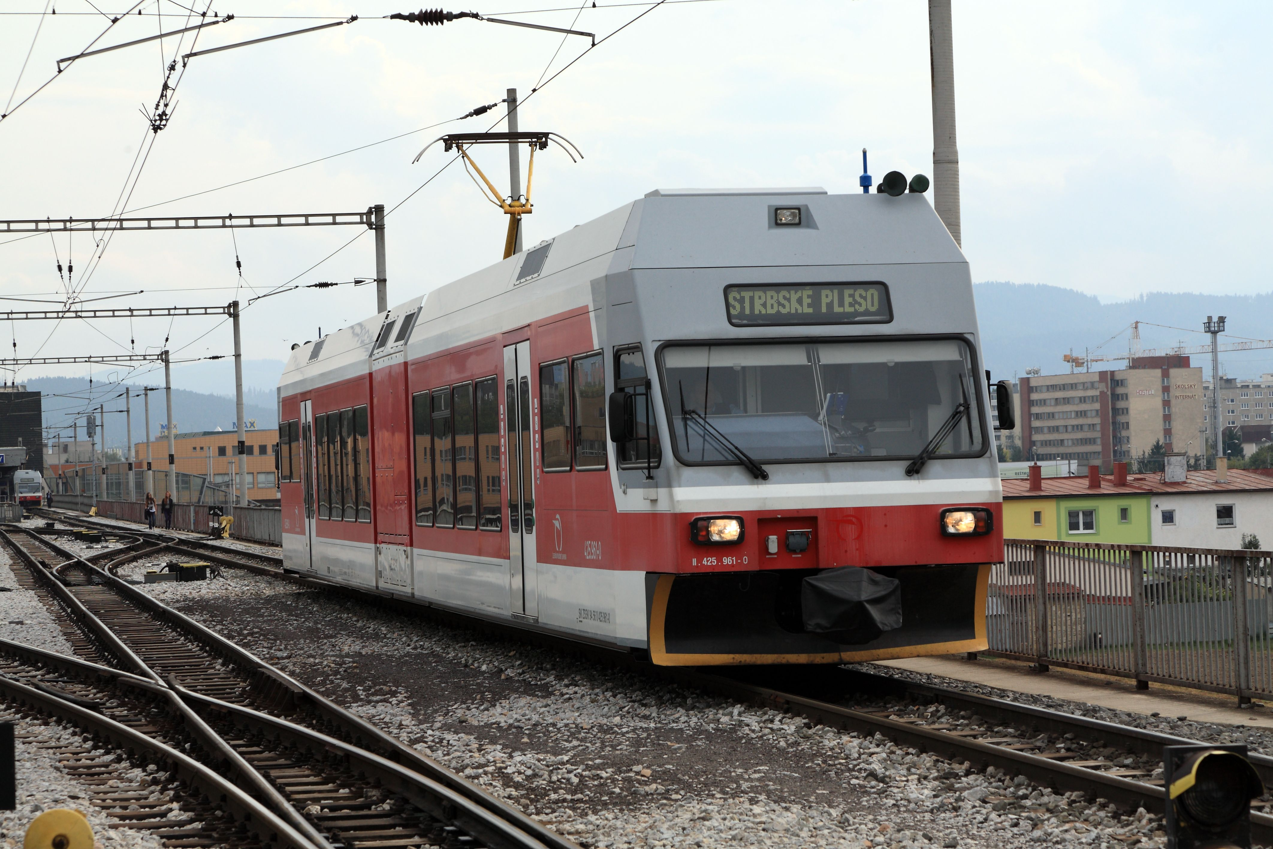 Ausfahrender Personenzug nach Štrbské Pleso. Im Vordergrund das Ausziehgleis und das Verbindungsgleis zum Bw.